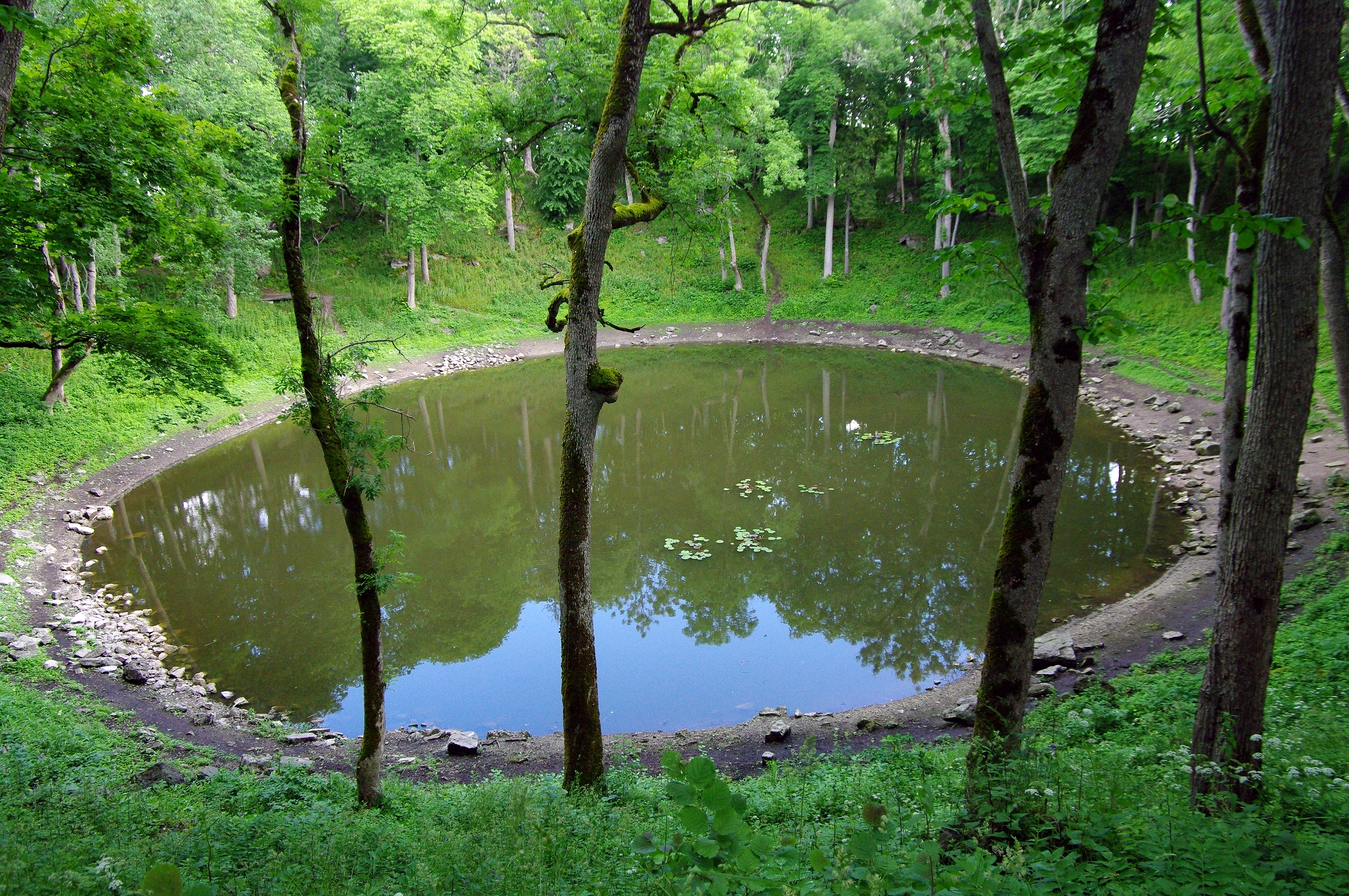 Kaali kraater